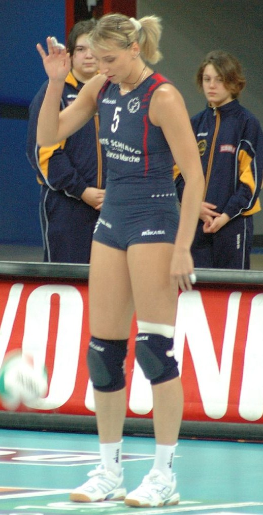 Russian volleyball player Lioubov Kılıç